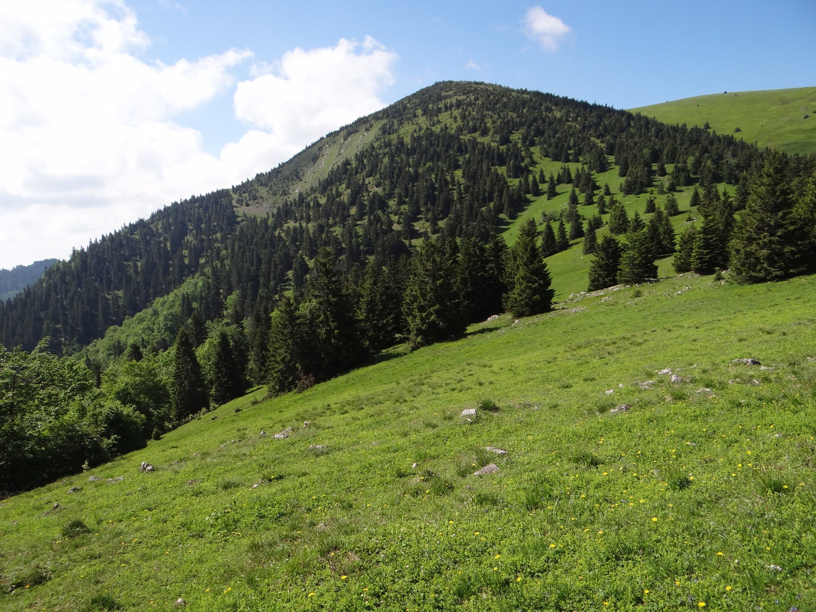 Suchý vrch (Veľká Fatra)